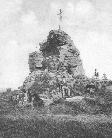 Vyhlídka (Schnuppstein) na Hradešíně u Dobré Vody nad Jabloncem n/Nisou